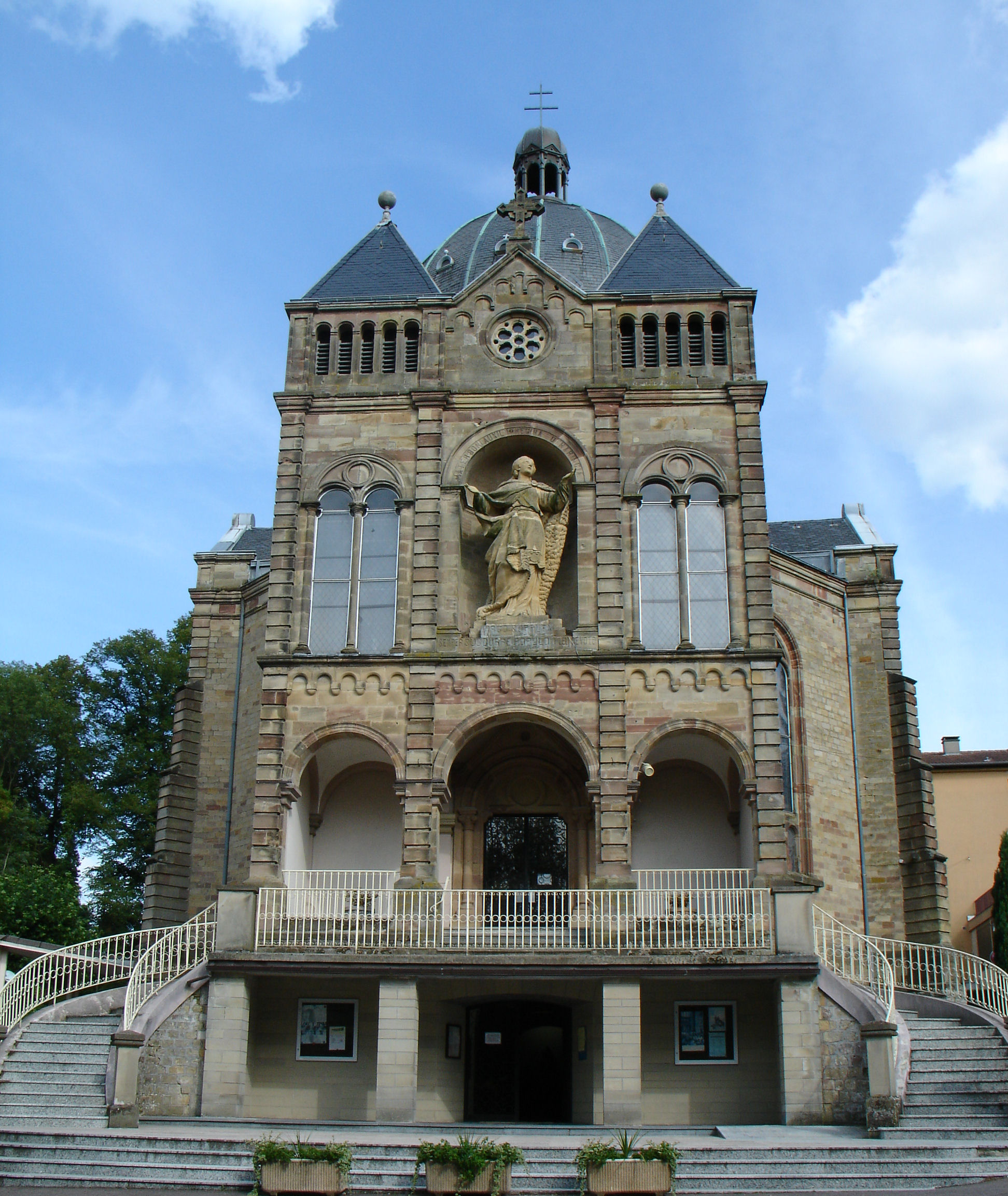 La Basilique Notre-Dame de Bons Secours de Saint-Avold.